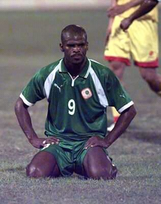 foto jorge Happy Valley